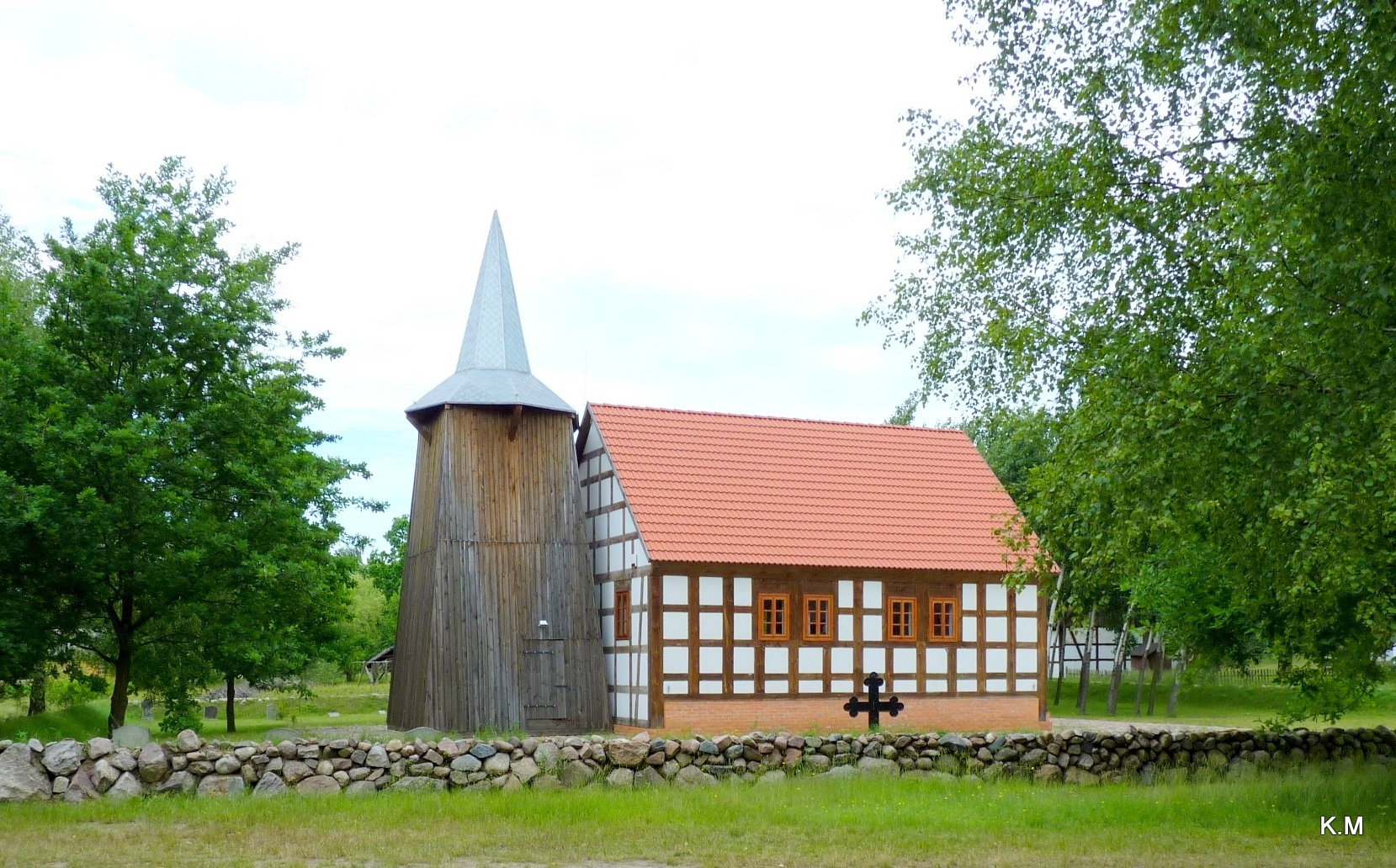 Etnograficzny skansen w Osieku nad Notecią .